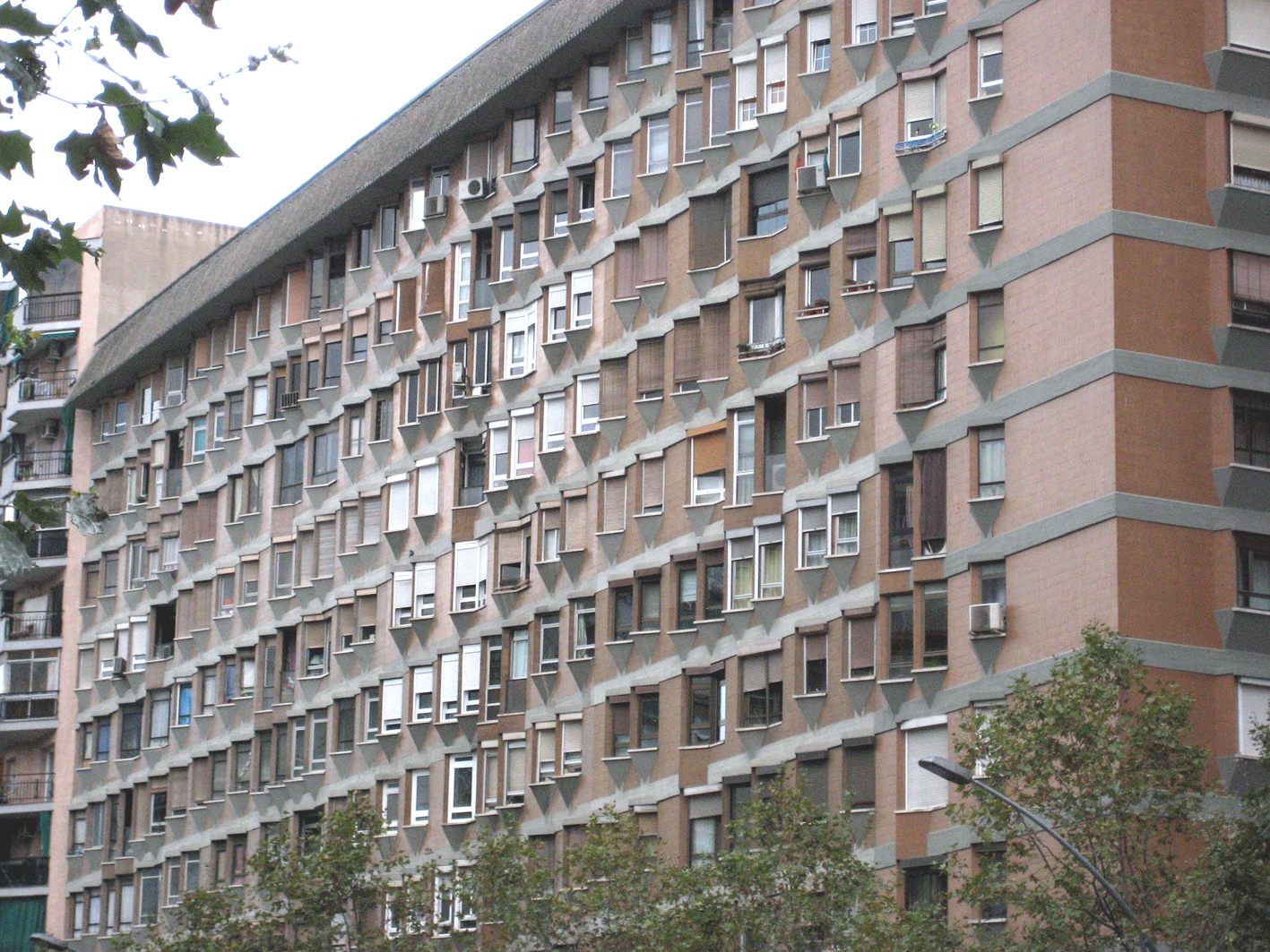 Edificio Meridiana de Oriol Bohigas en Barcelona.Cataluña.España